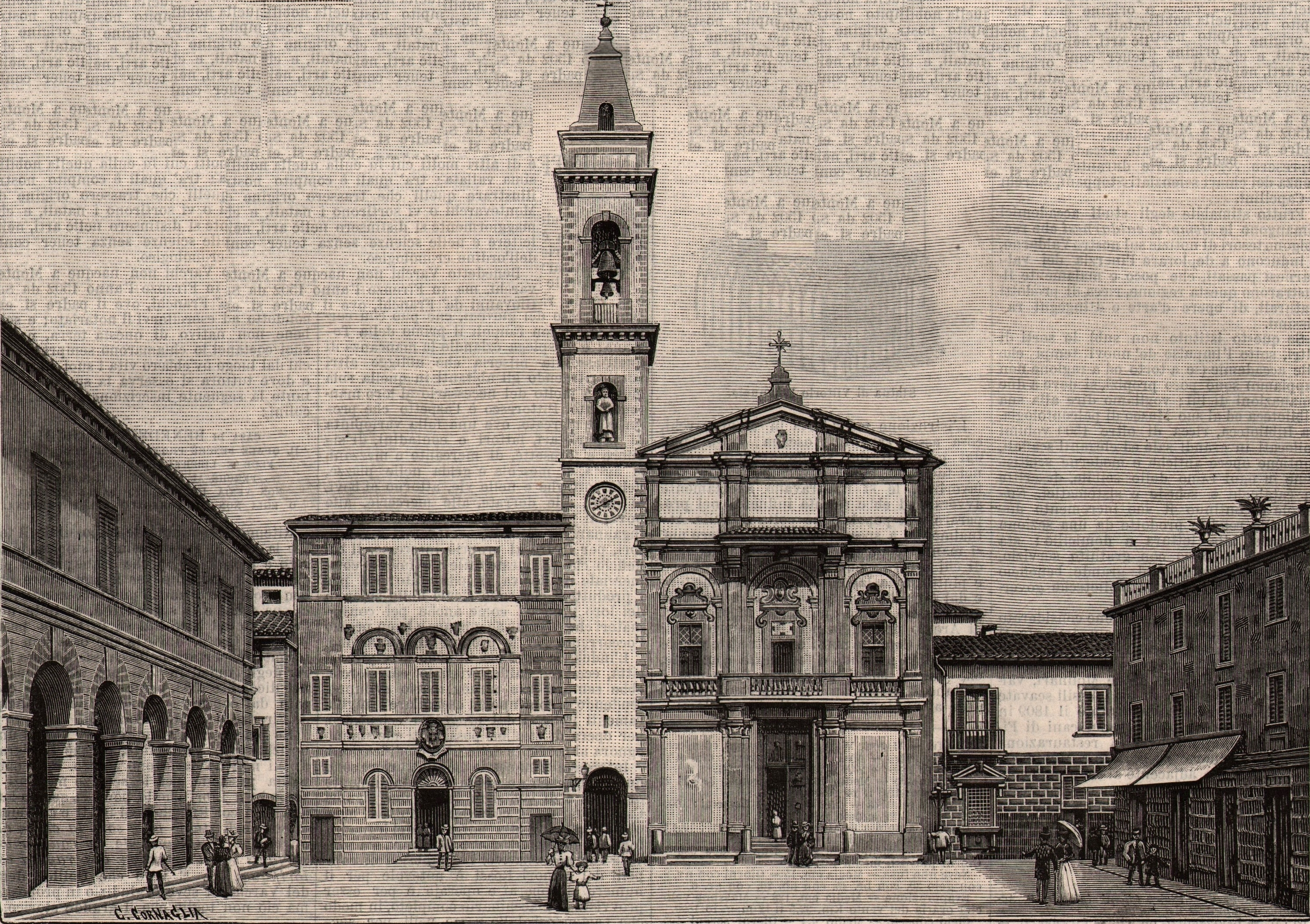 Piazza Varchi